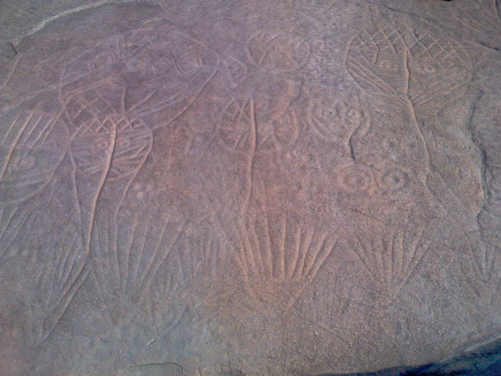 中文（中国大陆）: 将军崖岩画位于江苏连云港海州城区西南孔望山，是著名的史前崖画之一。